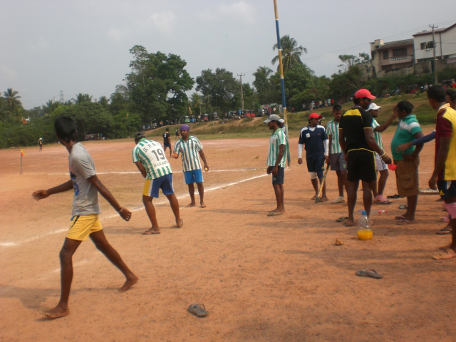 සිංහල: එල්ලේ කණ්ඩායමක තරගයක්